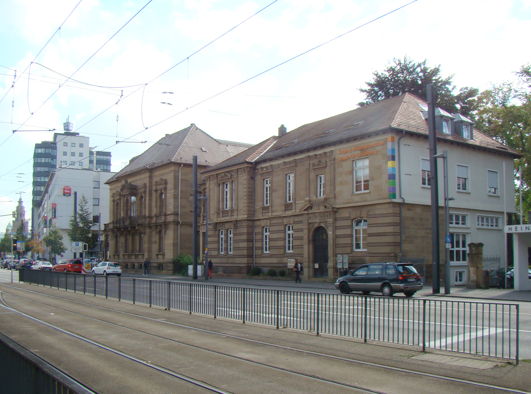 Villen in der Bahnhofstraße in Heilbronn